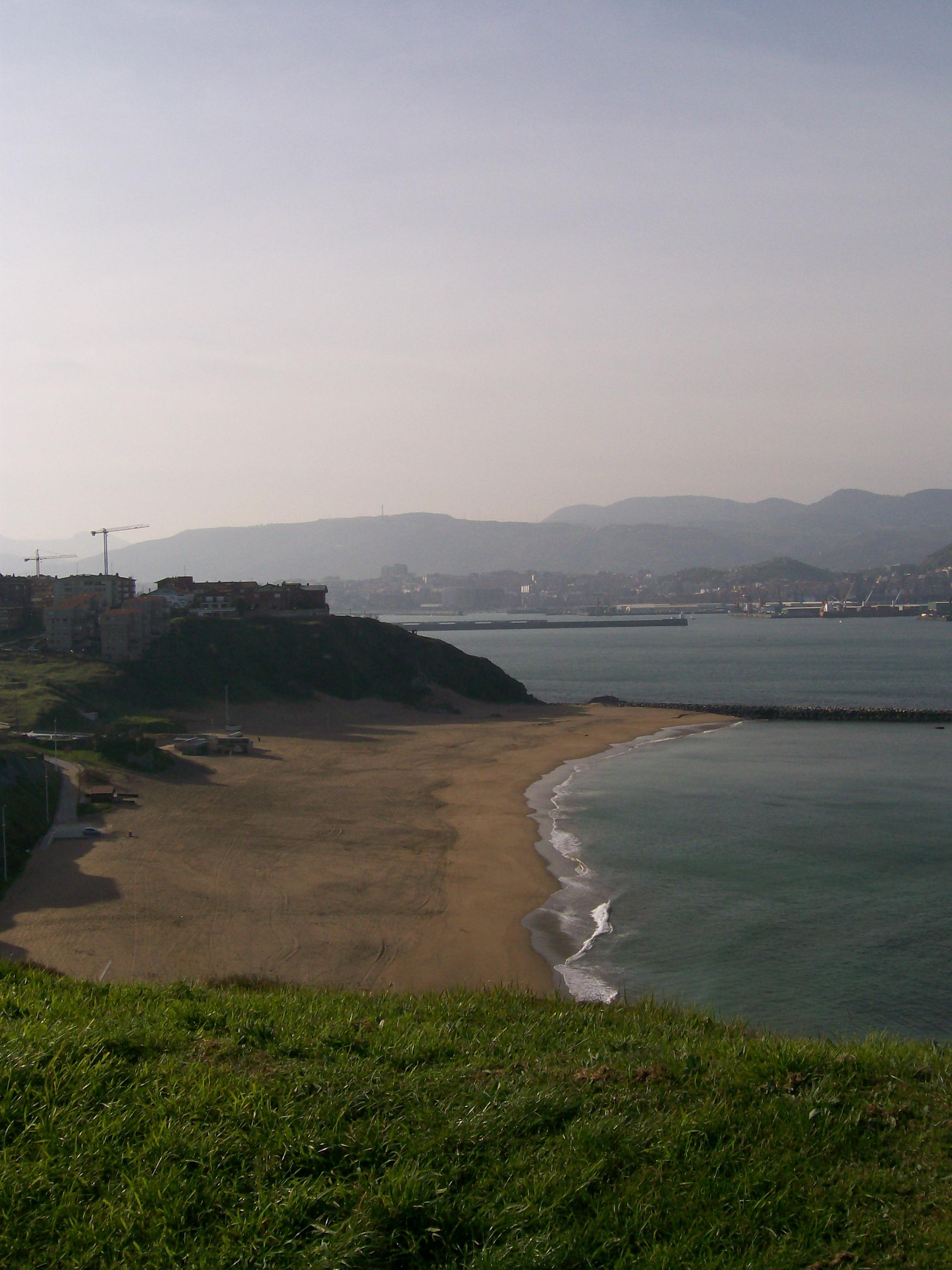 Arrigunaga hondartzaren ikuspegia